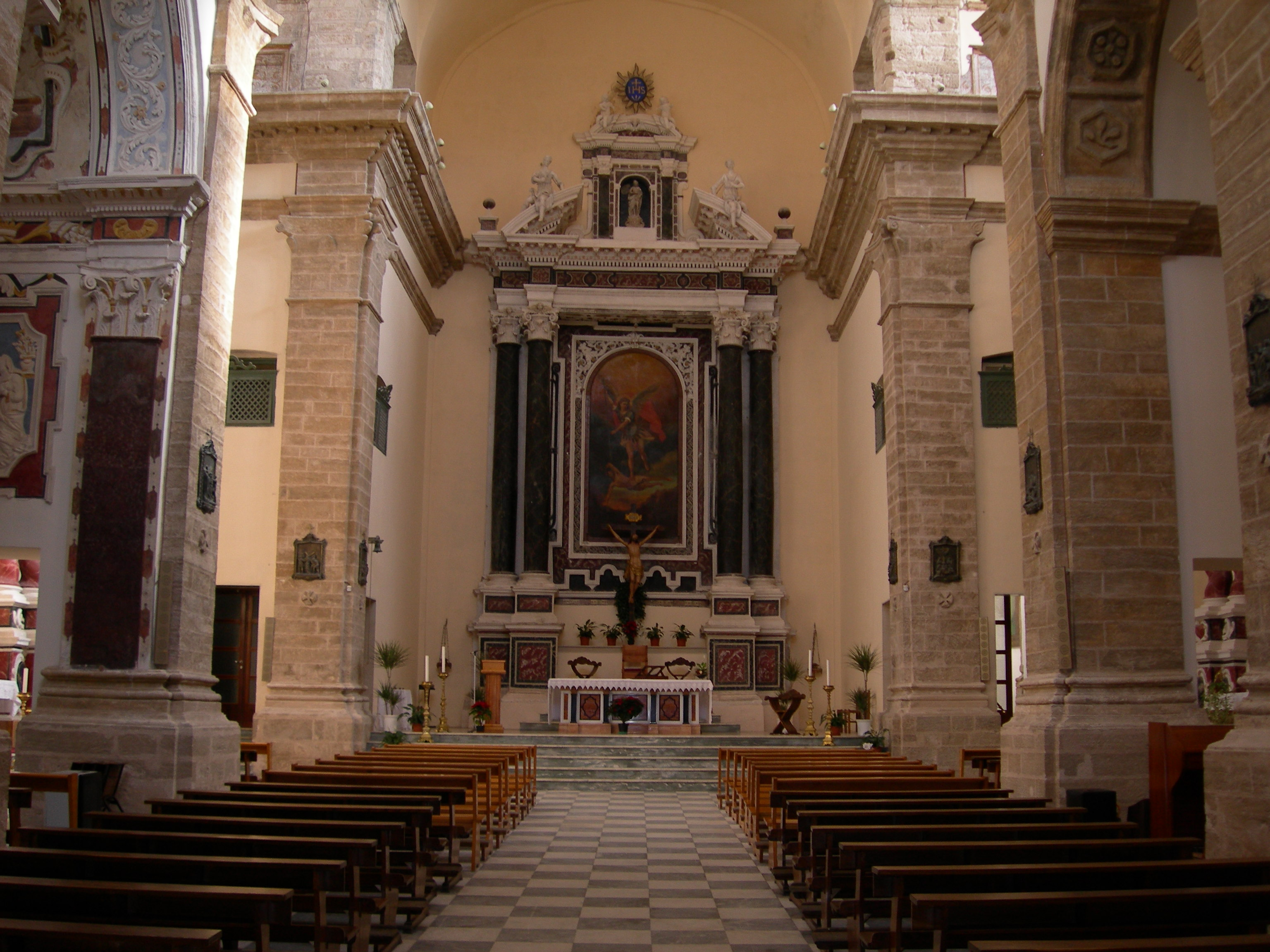 Altare maggiore della chiesa di San Michele, Alghero (Sardegna).